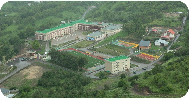 Вид с вертолета на Специализированный лицей "Арыстан"